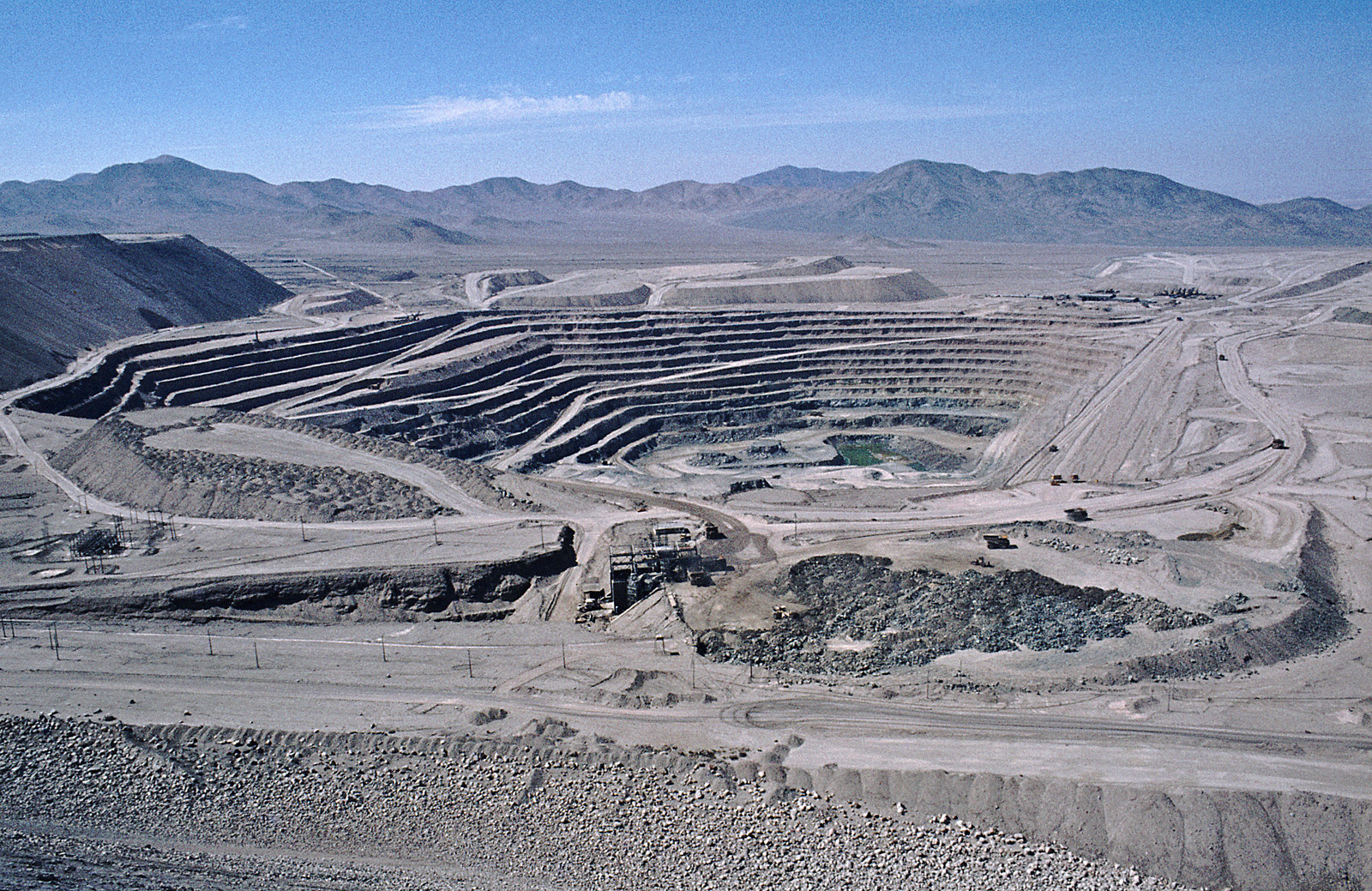 Coppermine Chuquicamata, Chile